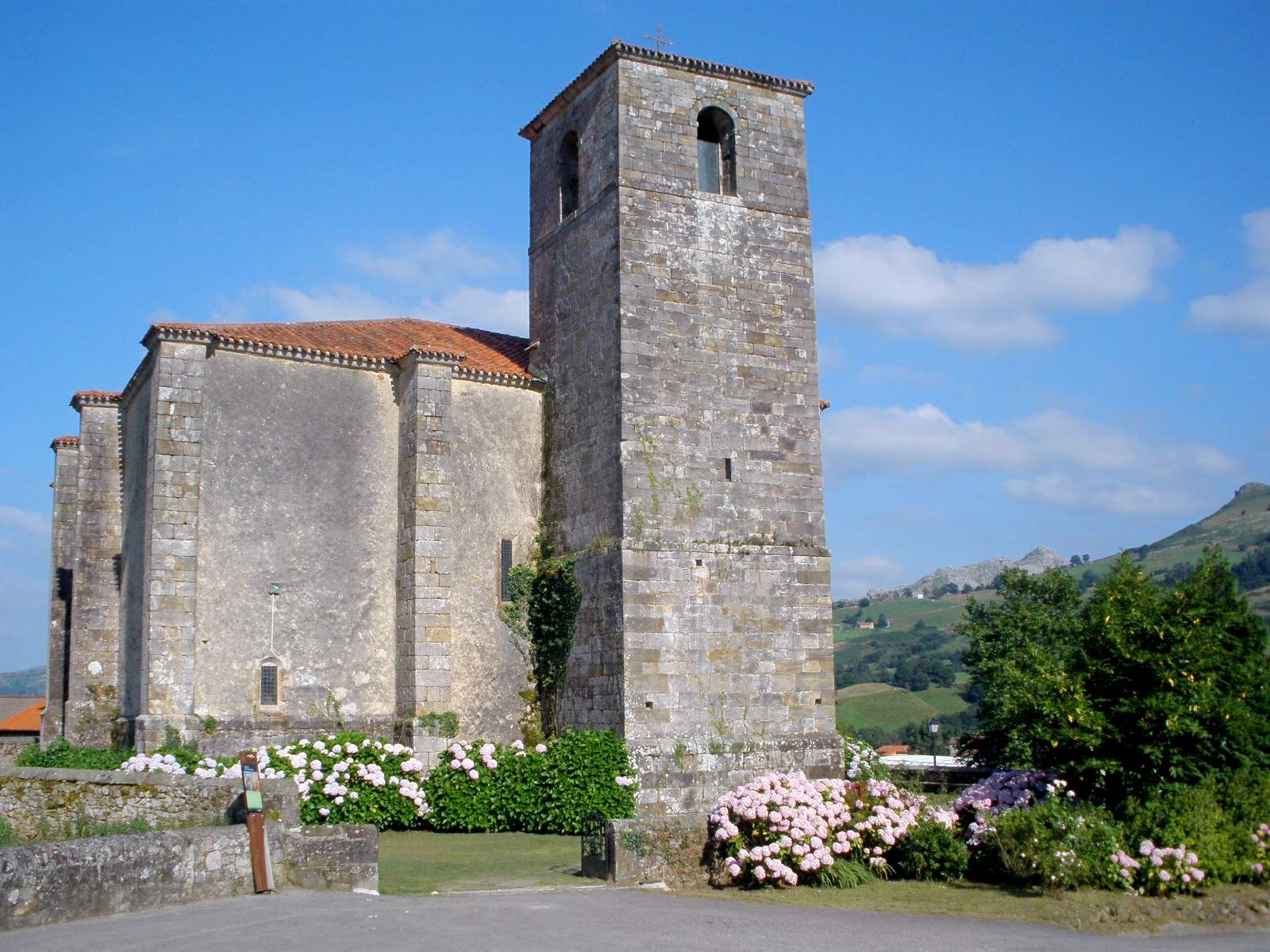 Iglesia de San Pedro ad Víncula (Liérganes, Cantabria)